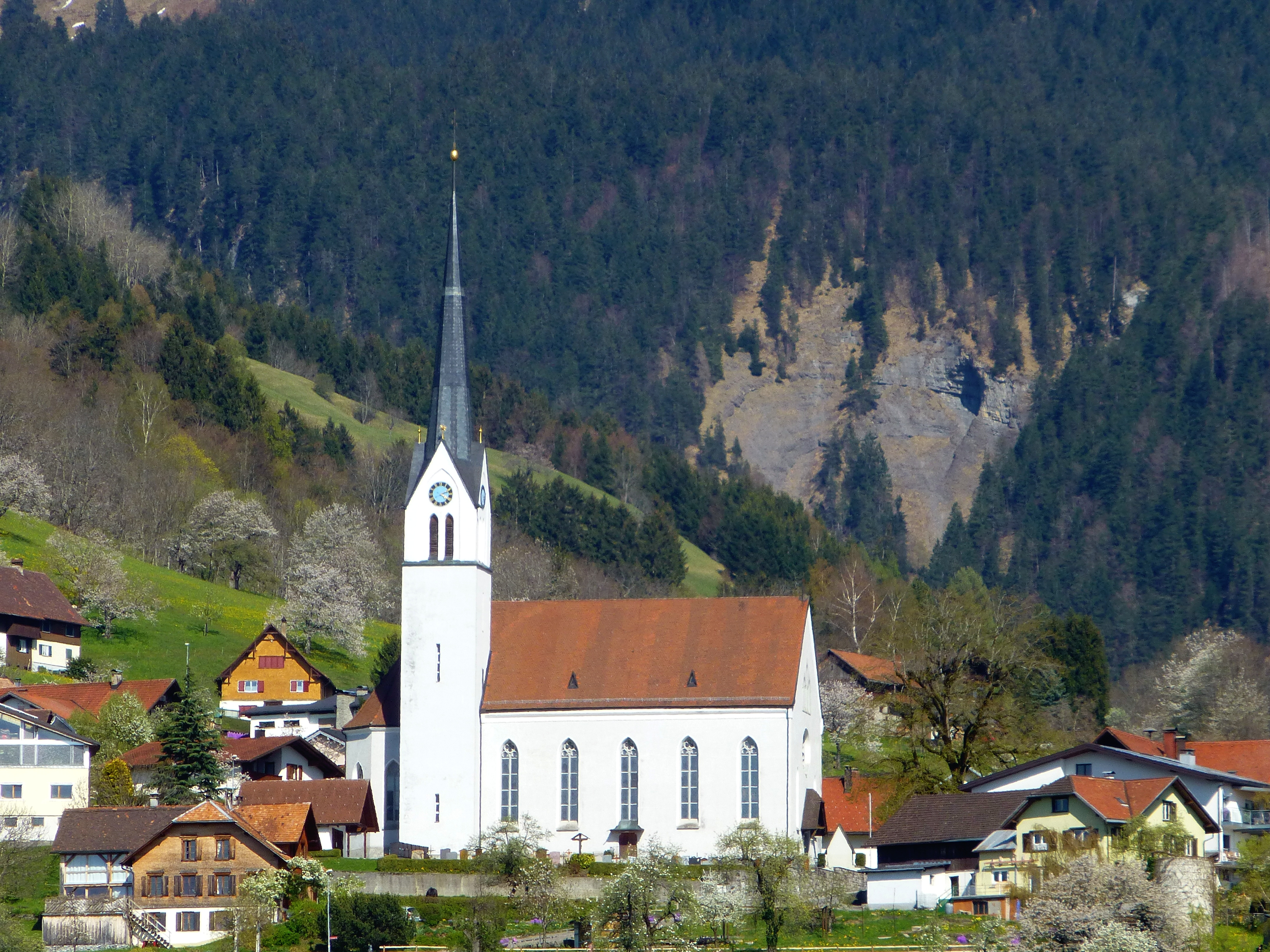 Blick vom Aussichtspunkt Rüttischrofen auf die Westseite der Pfarrkirche Fraxern